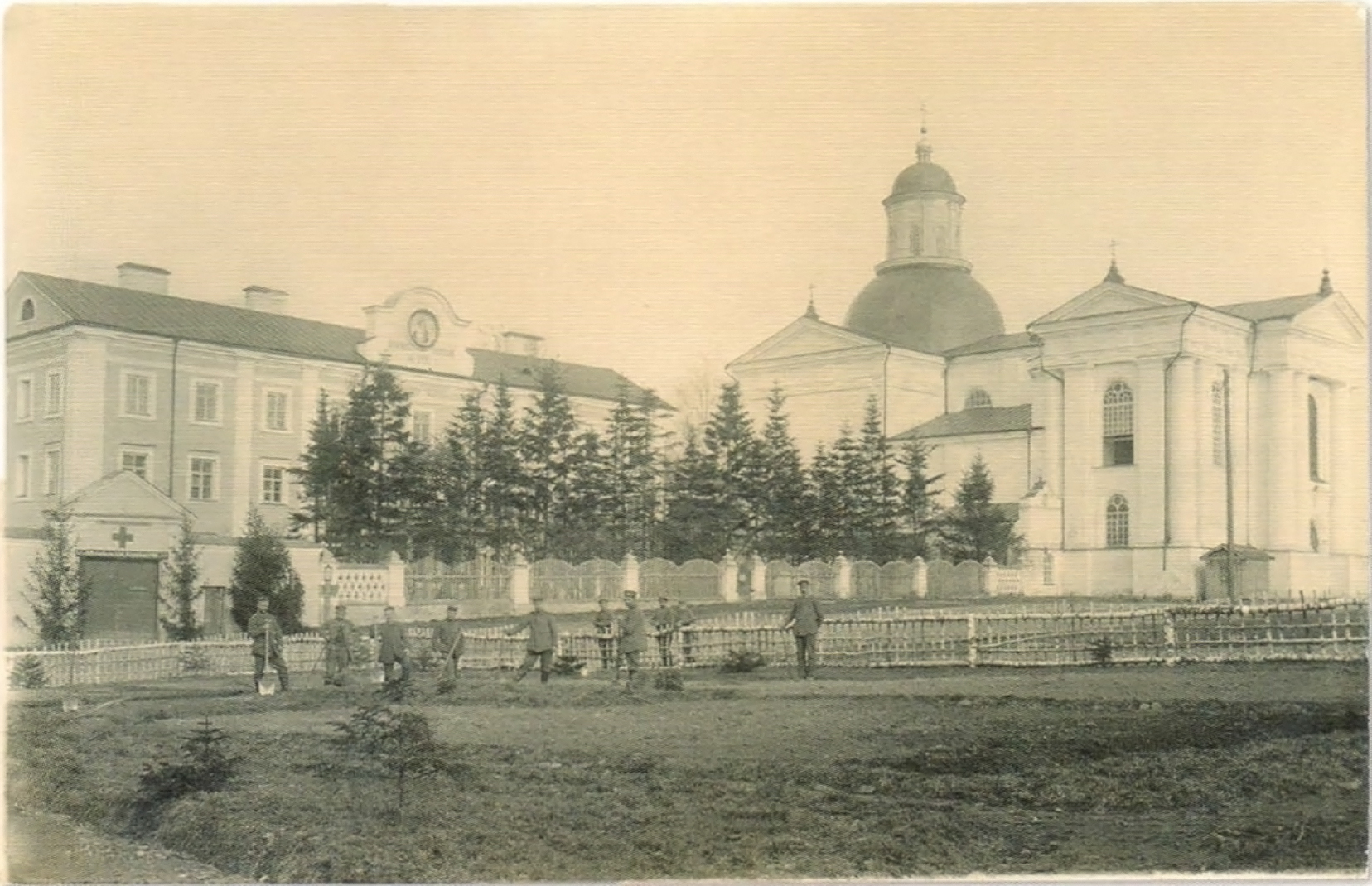 Беларуская (тарашкевіца): Жыровічы (Žyrovičy), вуліца Саборная (vulica Sabornaja). Прачысьценскі манастыр базылянаў